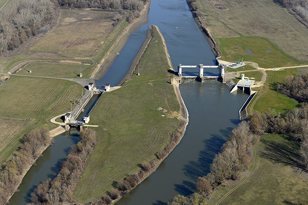 A békésszentandrási Hármas-Körös duzzasztómű légifelvételen